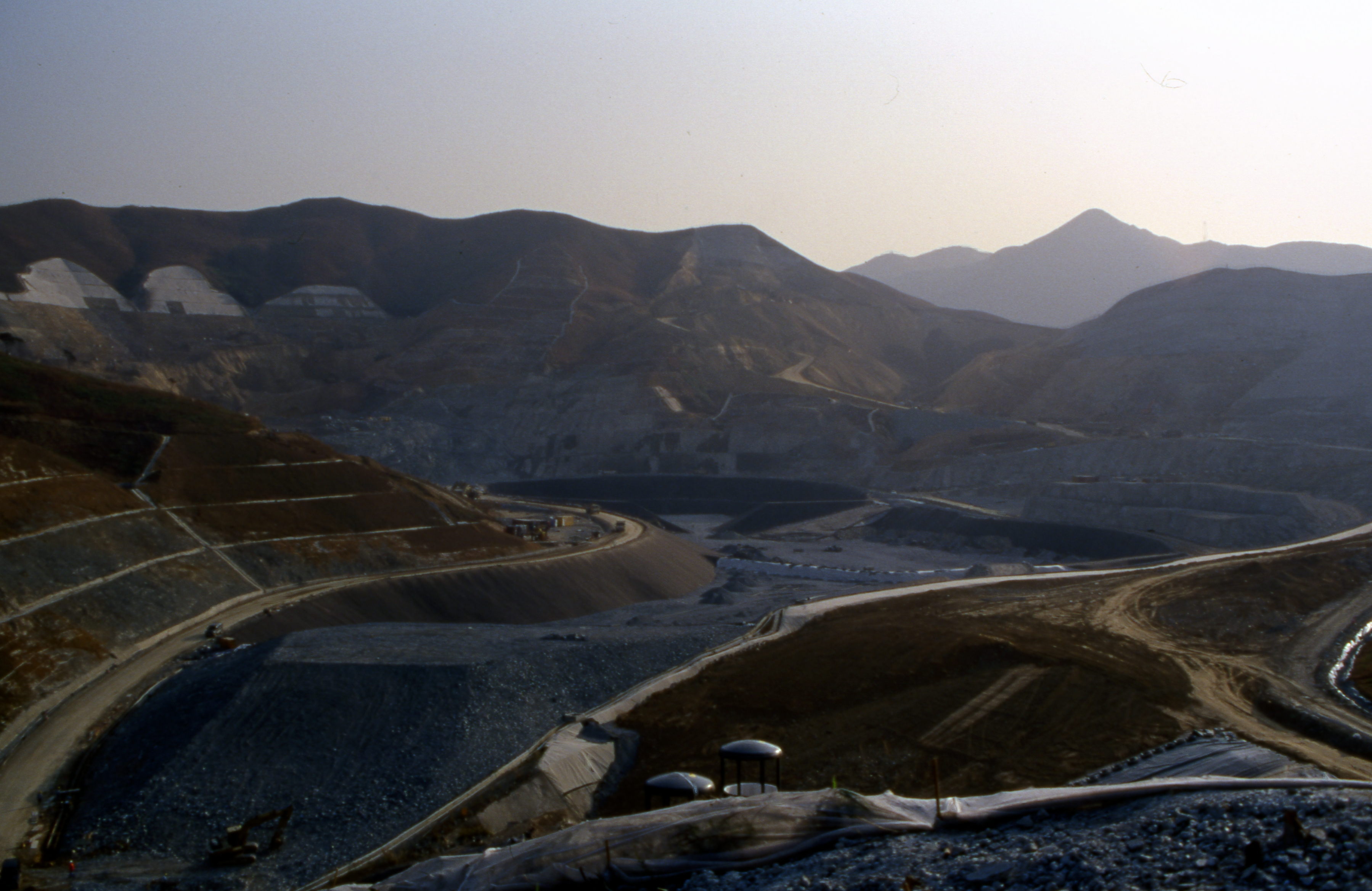 HongKong1997